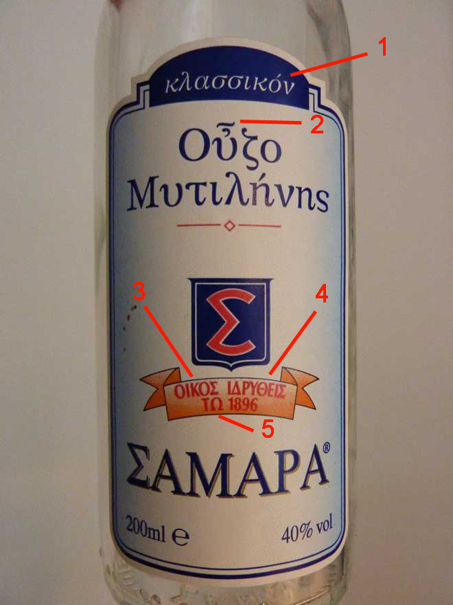 Etikett einer 200-ml-Ouzoflasche der Marke Samara. Darauf sind verschiedene Aspekte des hochsprachlichen Einflusses im Griechenland der Gegenwart festzustellen: 1. Morphologisch: die altgriechische Endung -ν beim Adjektiv κλασσικόν, 2. Polytonische Schreibweise, 3. Lexik: οἶκος anstelle von dimotiki-neugr. σπίτι, 4. Morphologisch: Partizip Aorist Passiv ἰδρυθείς, 5. Kasus: Dativ bei der Jahreszahl: τῷ ...